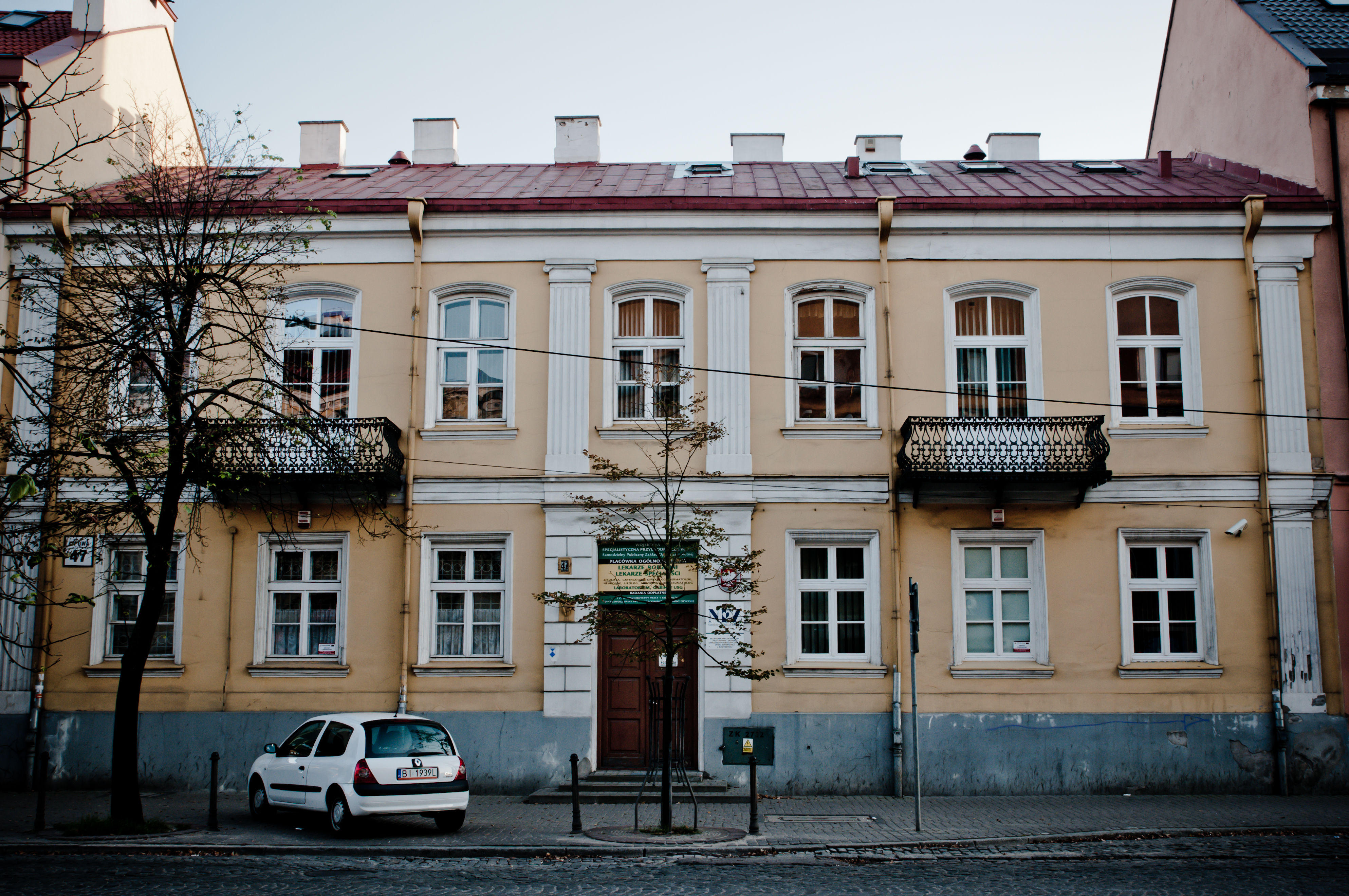 Białystok, ul. Lipowa 47 - kamienica, mur., 1936 (zabytek nr A-248 z 23.08.1994)